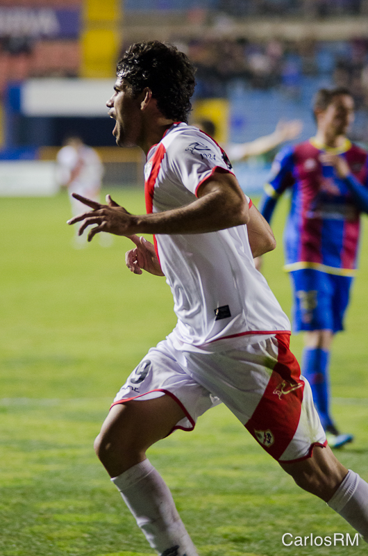 Levante - Rayo (Diego Costa)